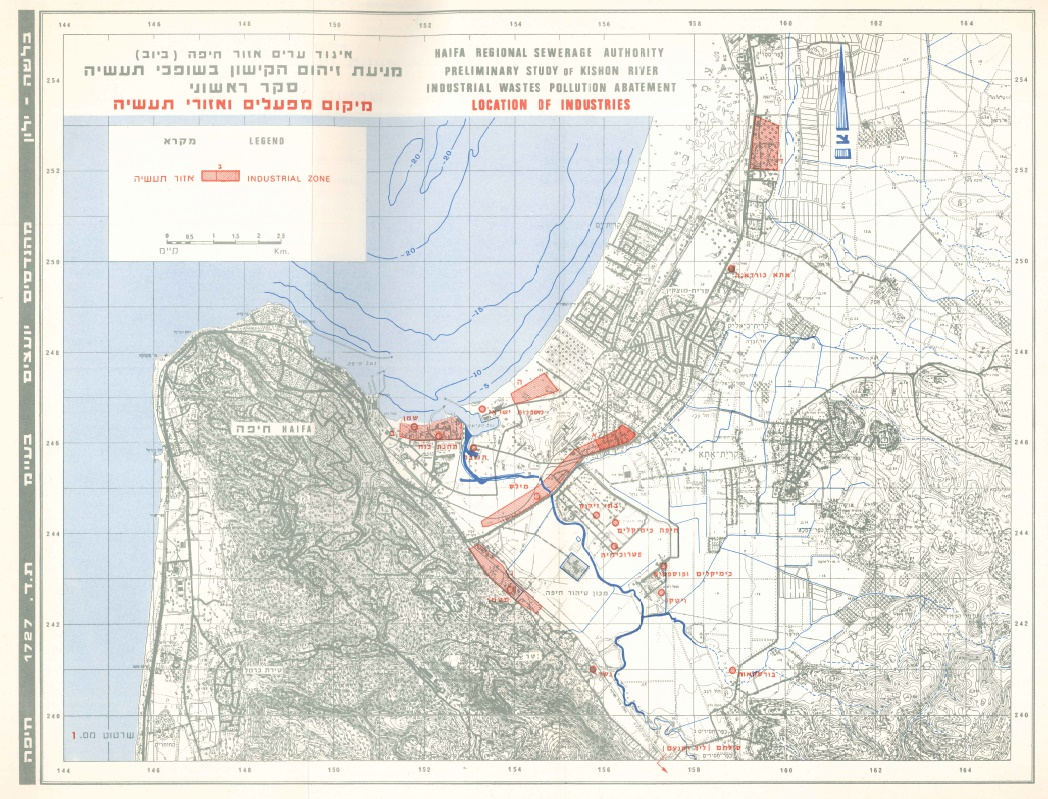 מיקום מפעלים ואזורי תעשיה באגן נחל הקישון